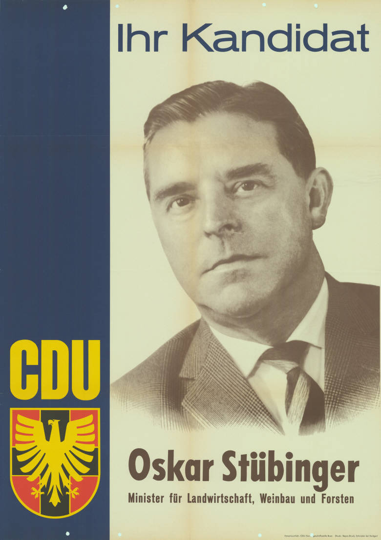 Ihr Kandidat CDU Oskar Stübinger Minister für Landwirtschaft, Weinbau und ForstenAbbildung:PorträtfotoKommentar:Rückseitig mit Kugelschreiber beschriftet.Plakatart:Kandidaten-/Personenplakat mit PorträtAuftraggeber:CDU-Bundesgeschäftsstelle, BonnDrucker_Druckart_Druckort:Repro-Druck, Schmiden bei StuttgartObjekt-Signatur:10-010 : 216Bestand:Landtagswahlplakate Rheinland-Pfalz (10-010)GliederungBestand10-18:Landtagswahlplakate Rheinland-Pfalz (10-010) » CDULizenz:KAS/ACDP 10-010 : 216 CC-BY-SA 3.0 DE